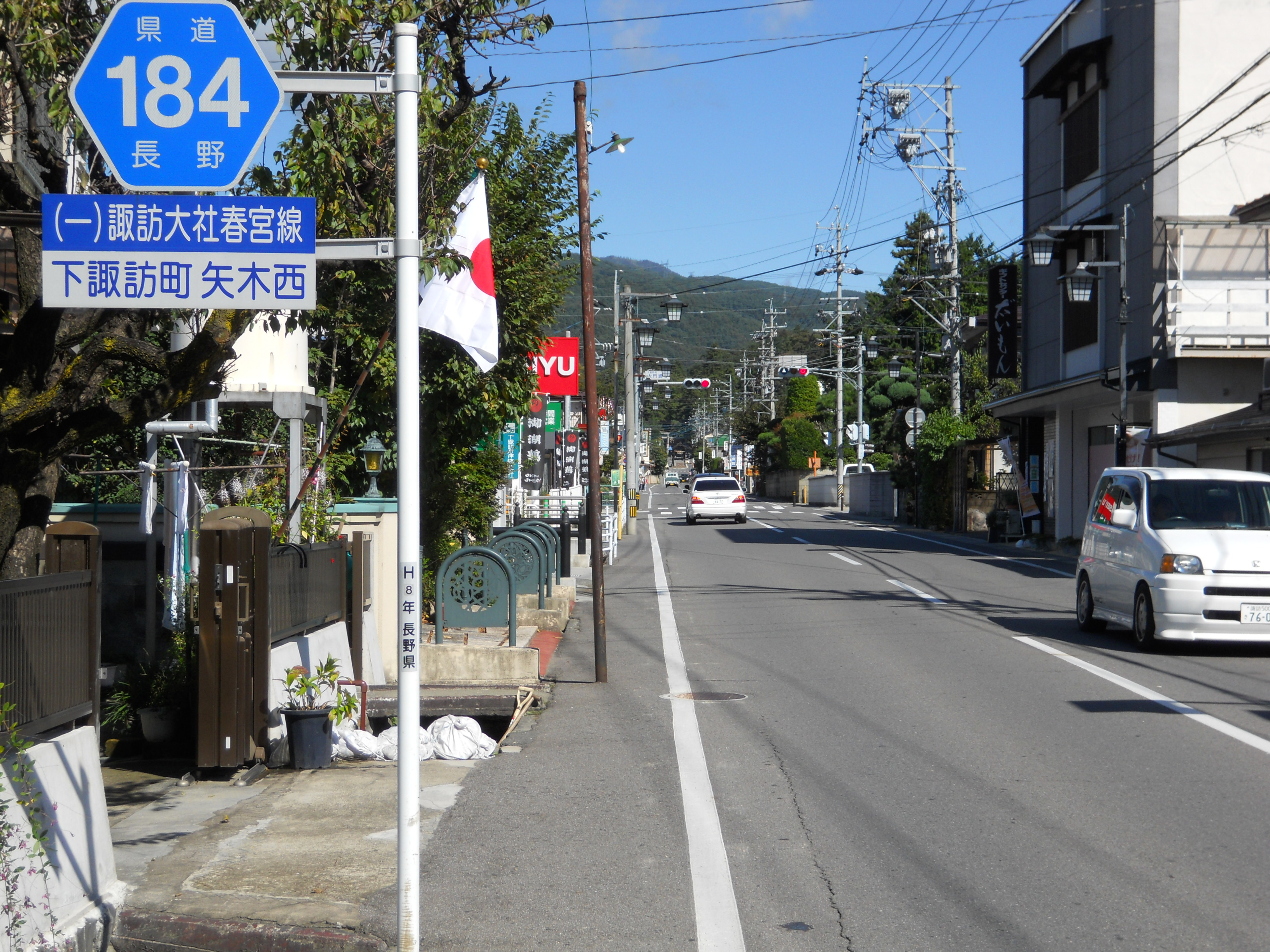 春宮大門付近